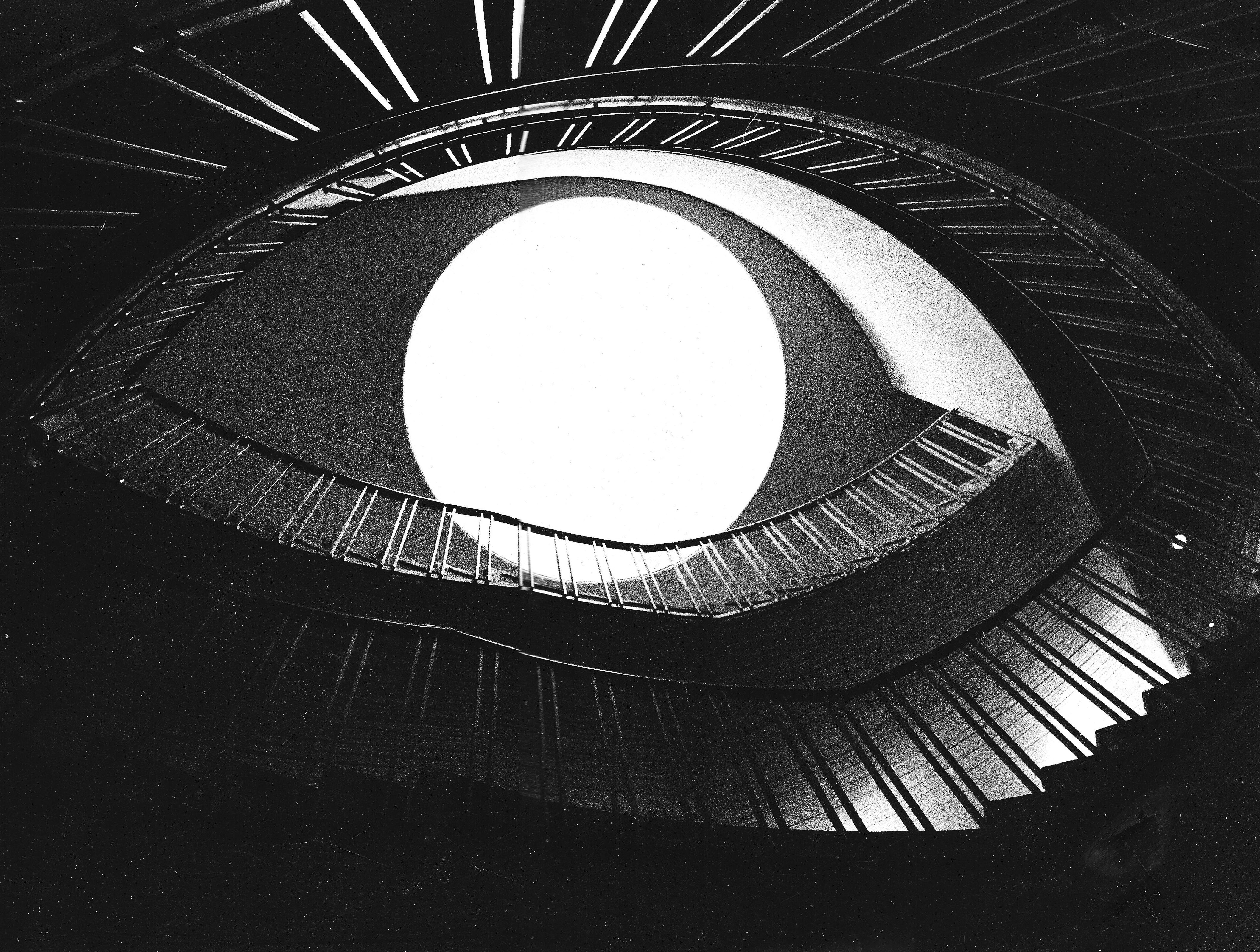 Töölön kirjaston portaikko